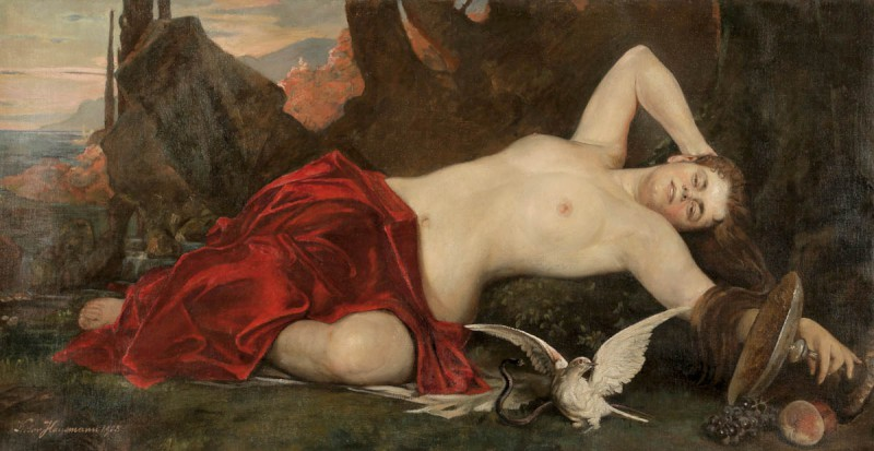 Gemälde des Malers Victor Hausmann (1858-1920)